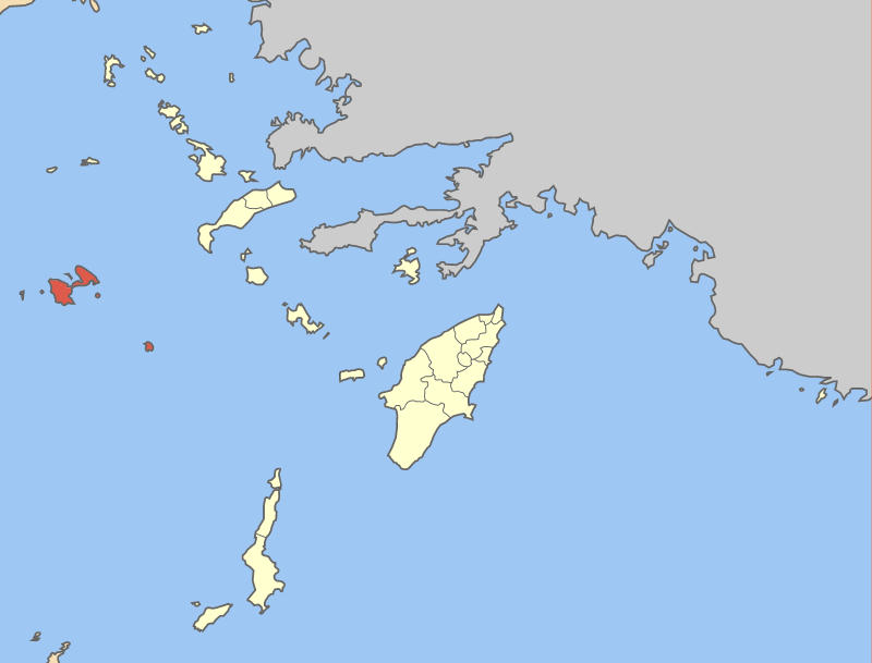 Locator map of Astypalea municipality (Δήμος Αστυπάλαιας) in Dodecanese prefecture (Νομός Δωδεκανήσου) in Greece.